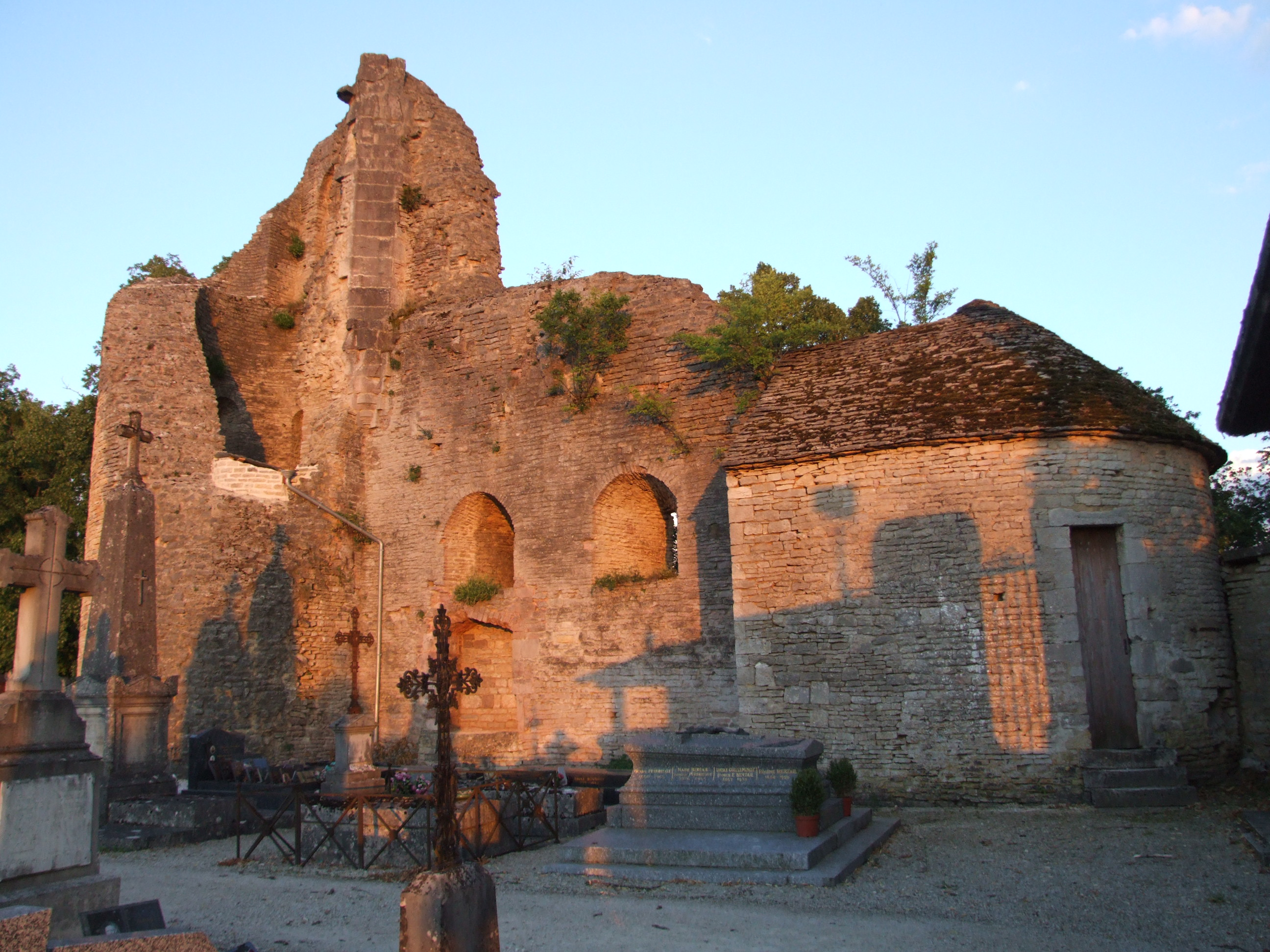 Vestiges du Château, Châtillon-sur-Seine, Côte-d'Or, Bourgogne, FRANCE